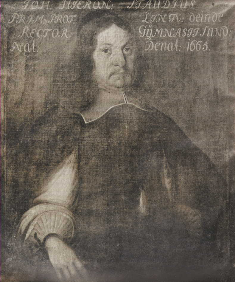 Bild des Greifswalder Professors Johann Hieronymus Staude (1615–1663)